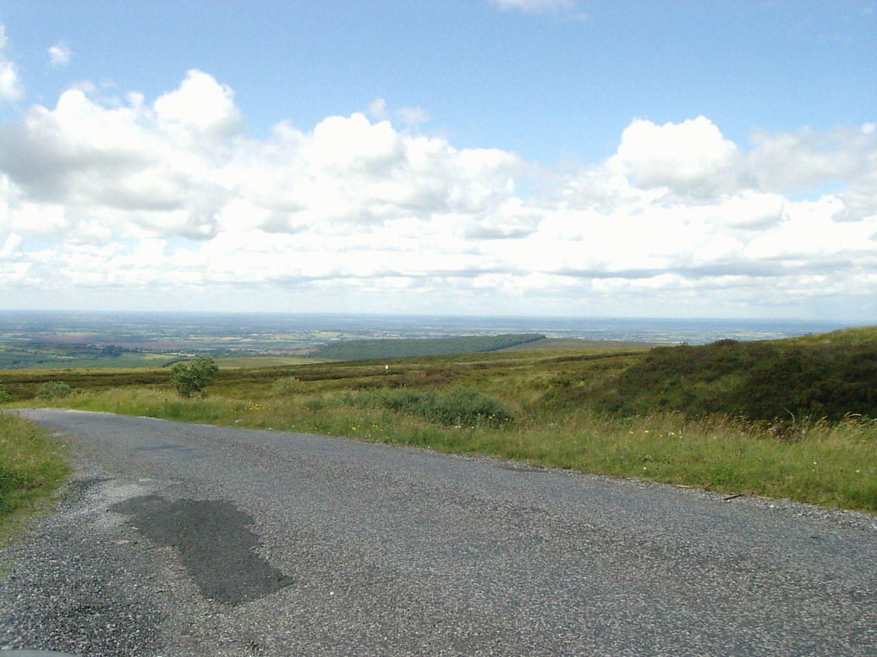 Uitzicht op County Offaly vanaf de Slieve Bloom Mountains in de Republiek Ierland